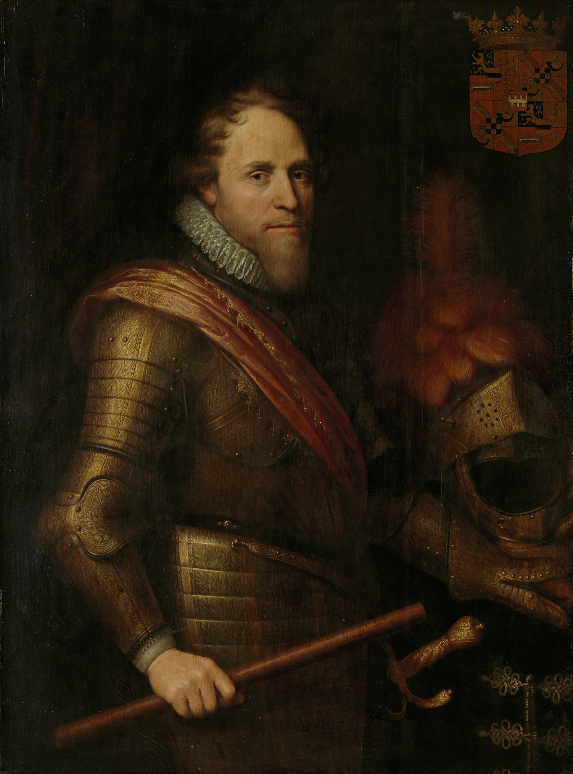 Portret van Maurits, prins van Oranje. Ten halven lijve, staand, in wapenrusting met de commandostaf in de rechterhand, de linkerhand rustend op een tafeltje waarop zijn helm staat. Rechtsboven het wapen van Maurits.